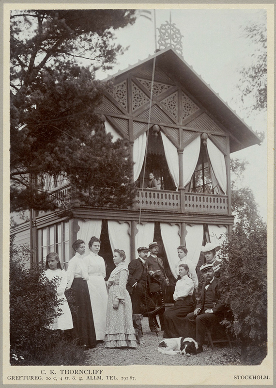 Depicted place: Uppland, Stockholm, Lidingö, Lidingö, Gångsätra (Sverige (SE))